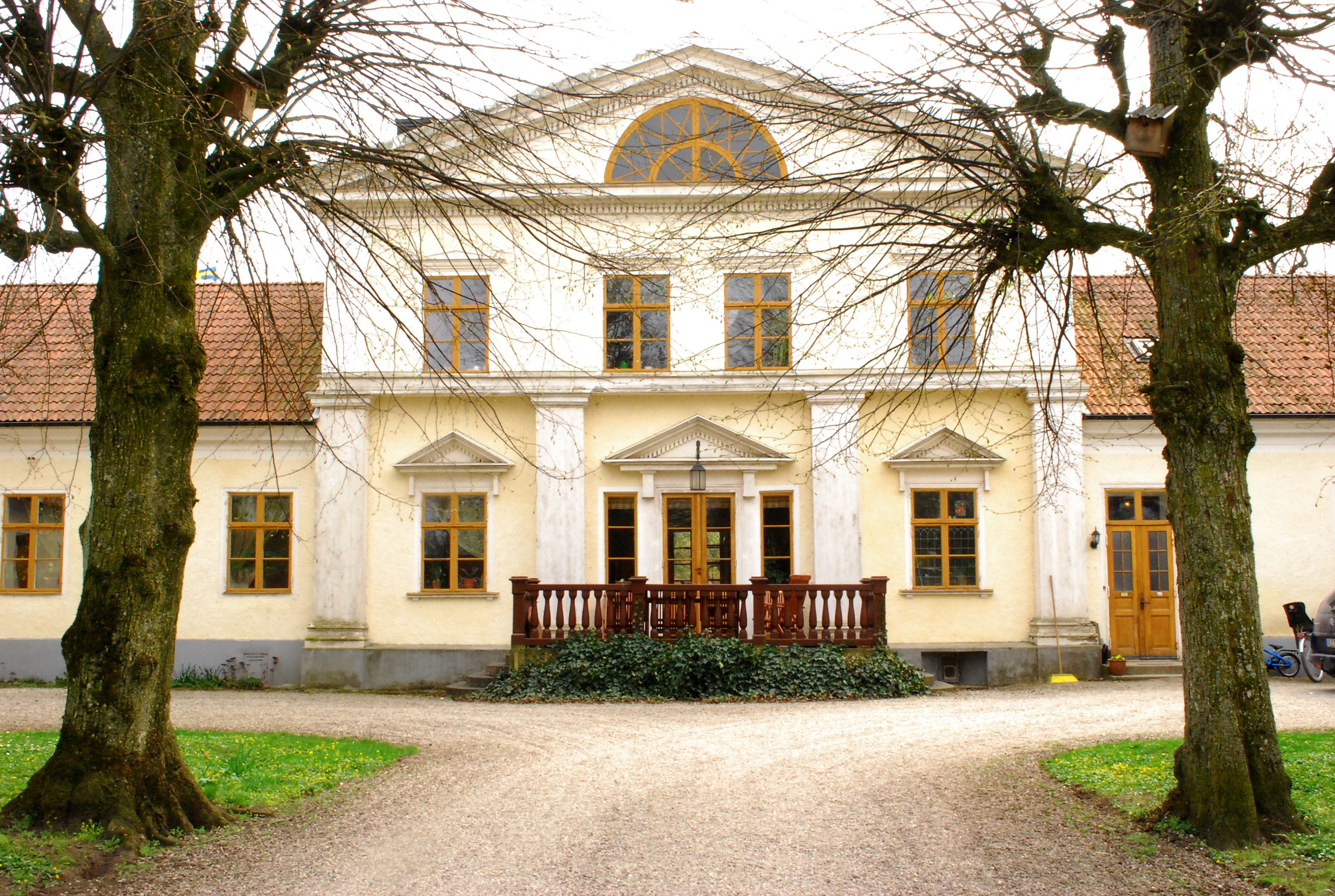 Stafva Gård, Barlingbo